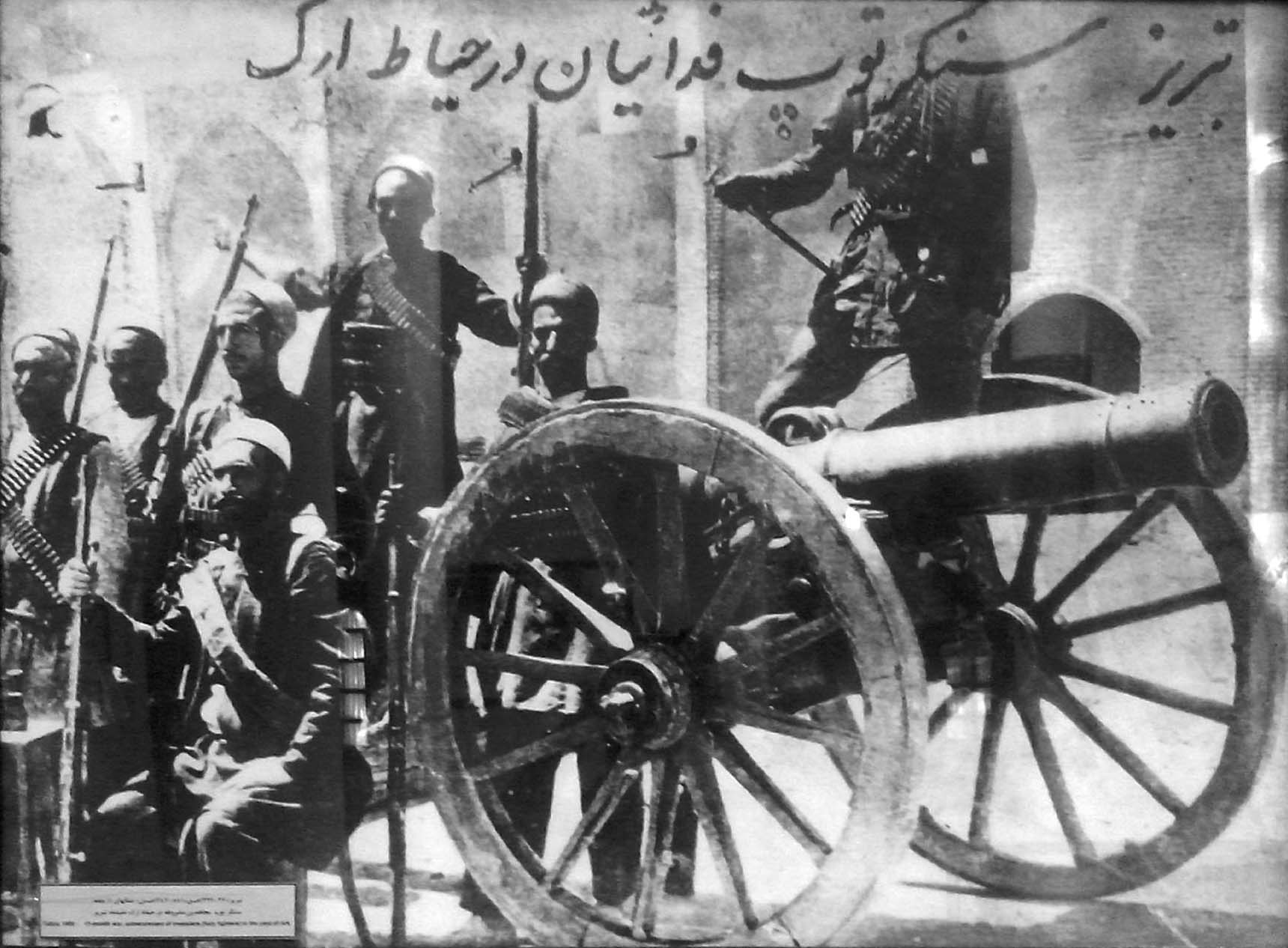 سنگر توپ مشروطه‌خواهان در جنگ‌های ۱۱ ماهه در حیاط ارگ تبریز. سال ۱۹۰۹ میلادی، ۸۸–۱۲۸۷ شمسی.